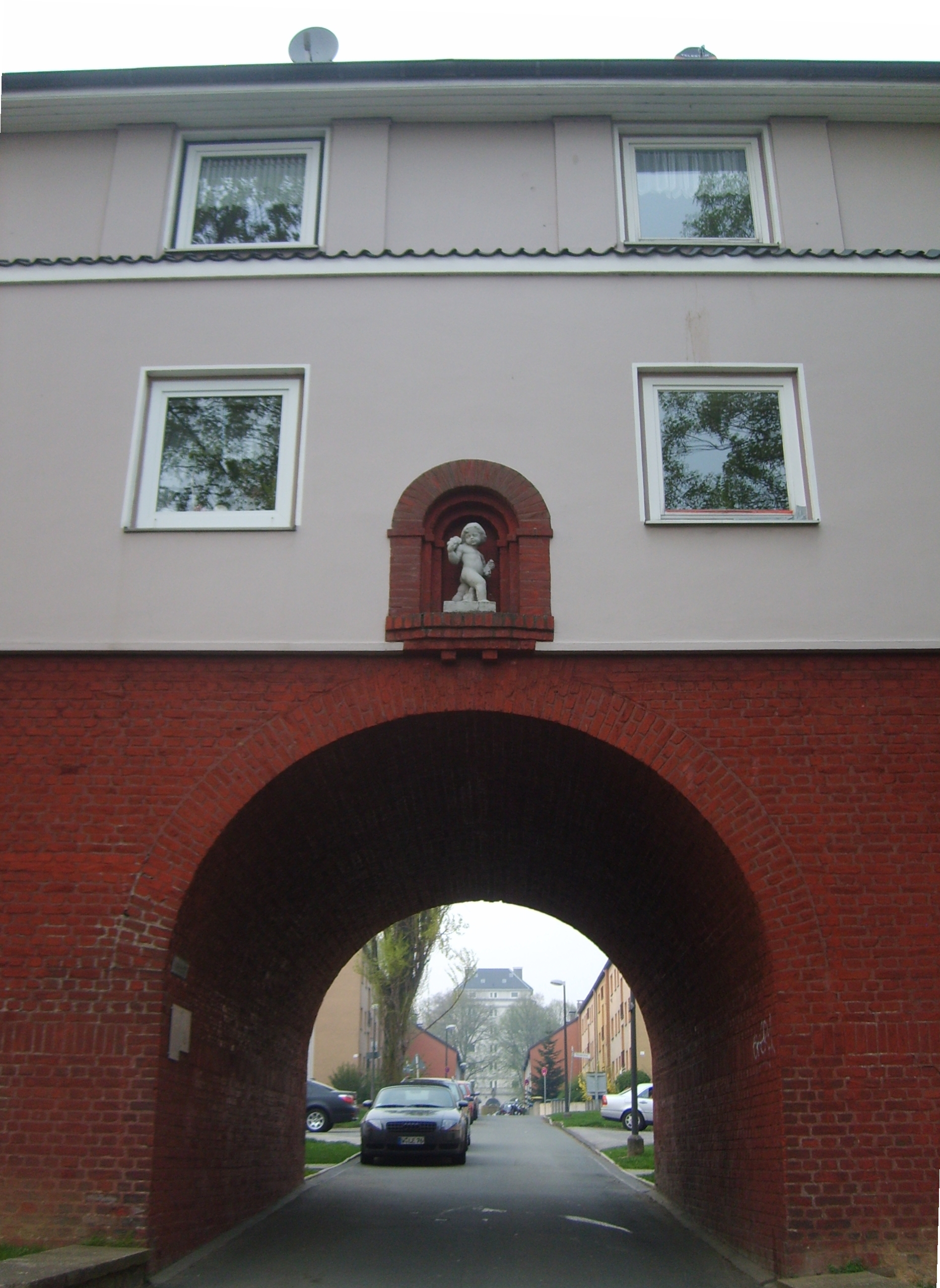 Siedlung Sedansberg, Wuppertal. Blick auf den Wohnturm entlang der Boelckestraße